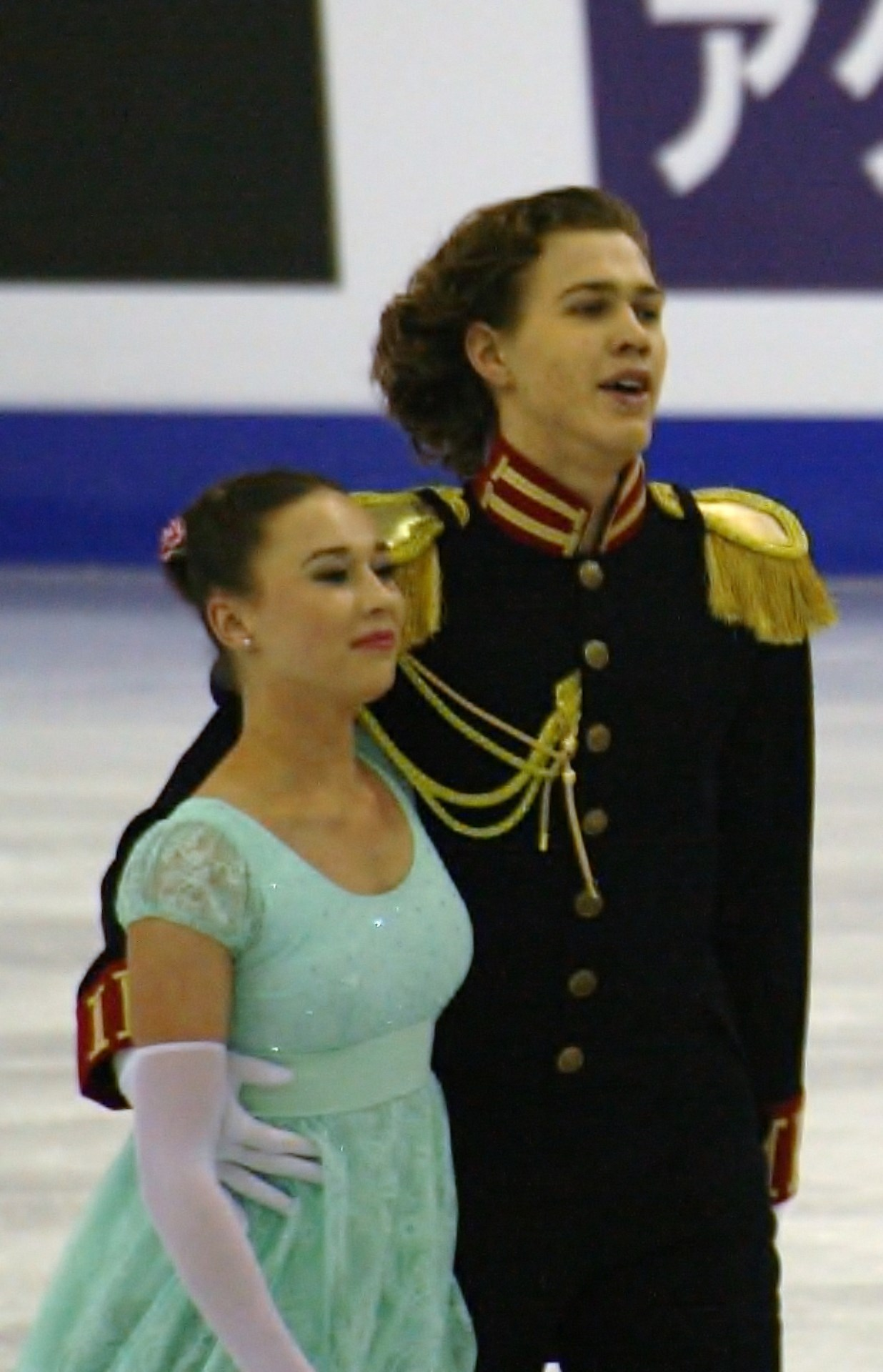 Алла Лобода и Павел Дрозд (Россия) на финале Гран-при по фигурному катанию среди юниоров 2015-2016.